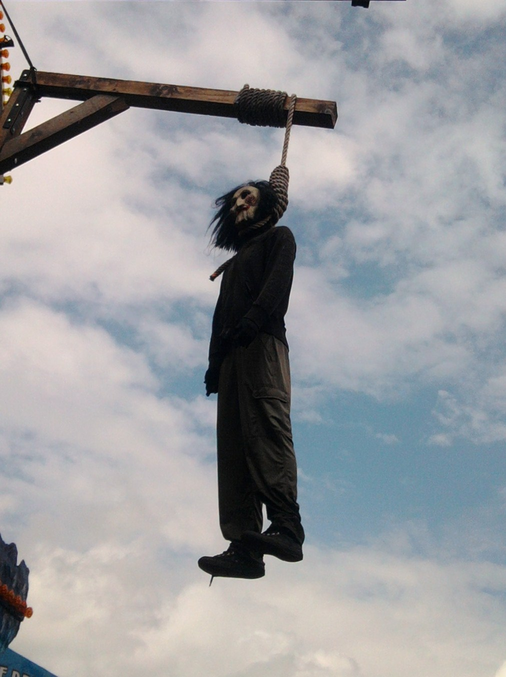 Saw dans un manège de la Foire Comtoise de Besançon (Doubs, France).